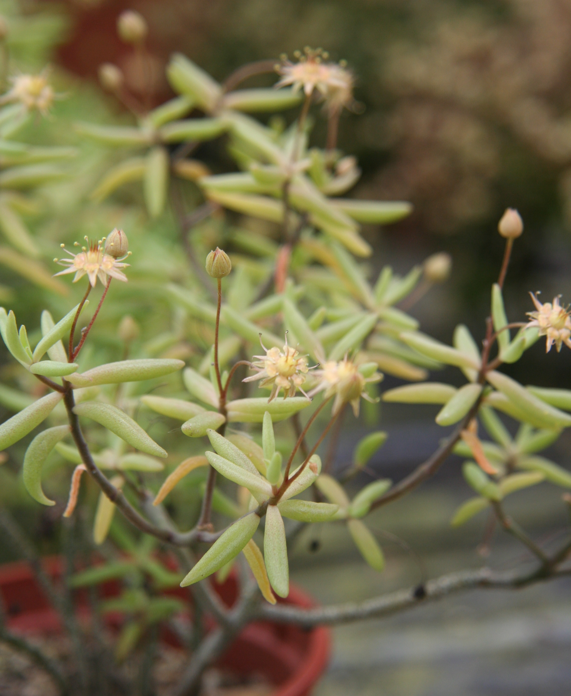 Monanthes anagensis in Blüte in der Gärtnerei Flores-Reinecke, Leverkusen